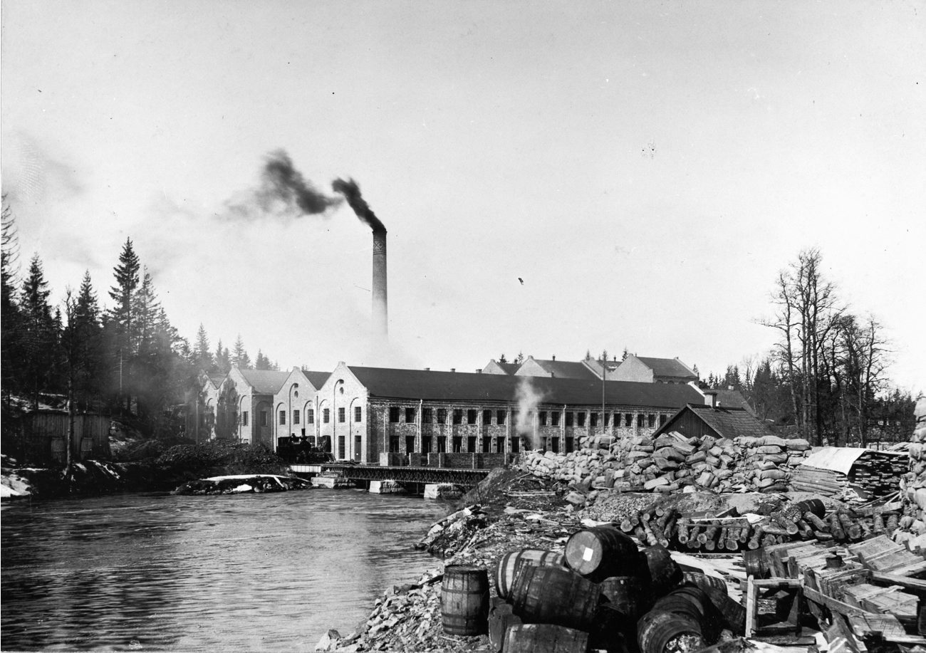 B16252. Frövi pappersbruk. Fotografiet är skänkt till Tekniska museet från Svenska Turistföreningen.